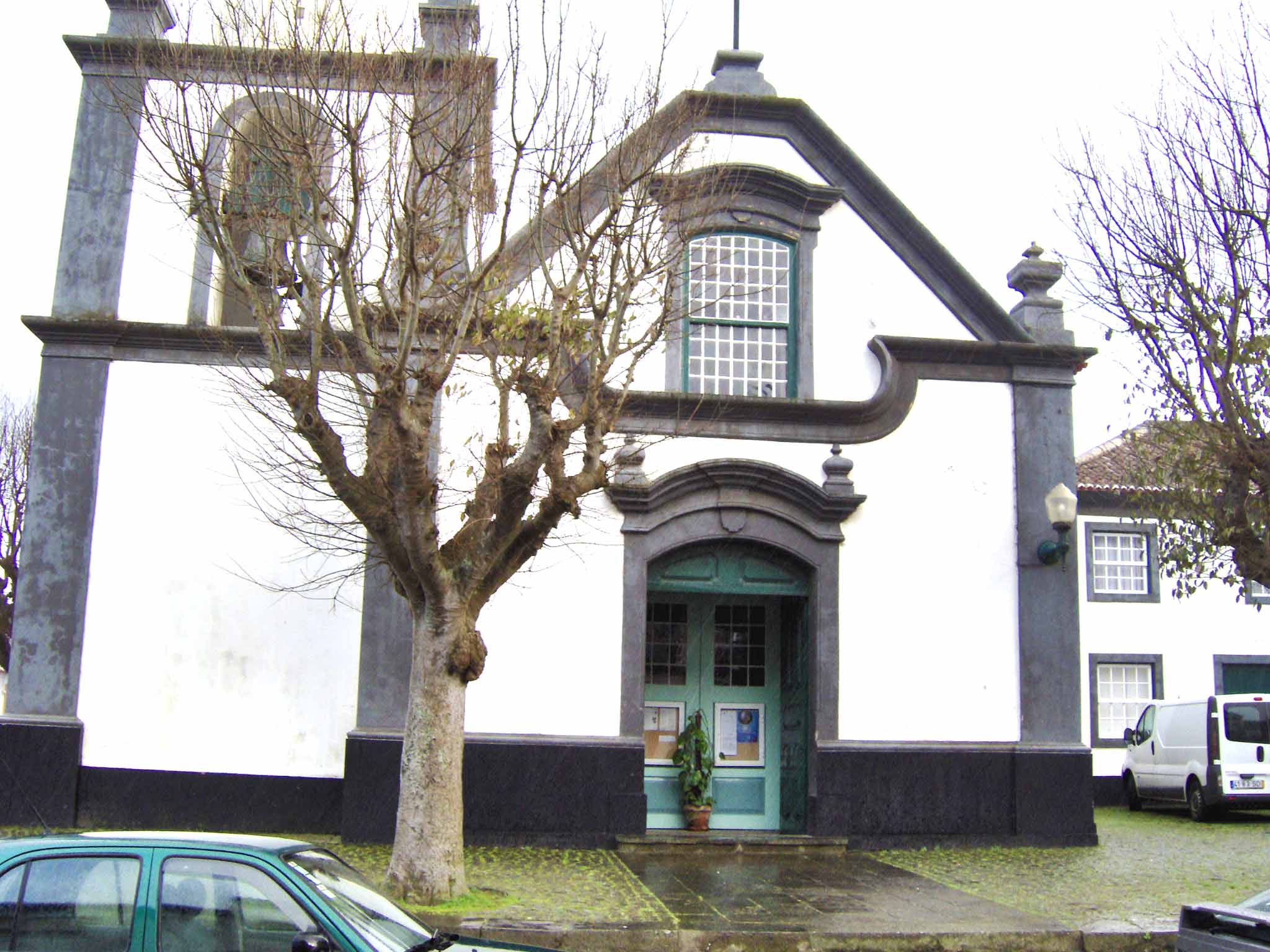 Igreja de São Pedro, Angra do Heroísmo, ilha Terceira, Açores, Portugal.